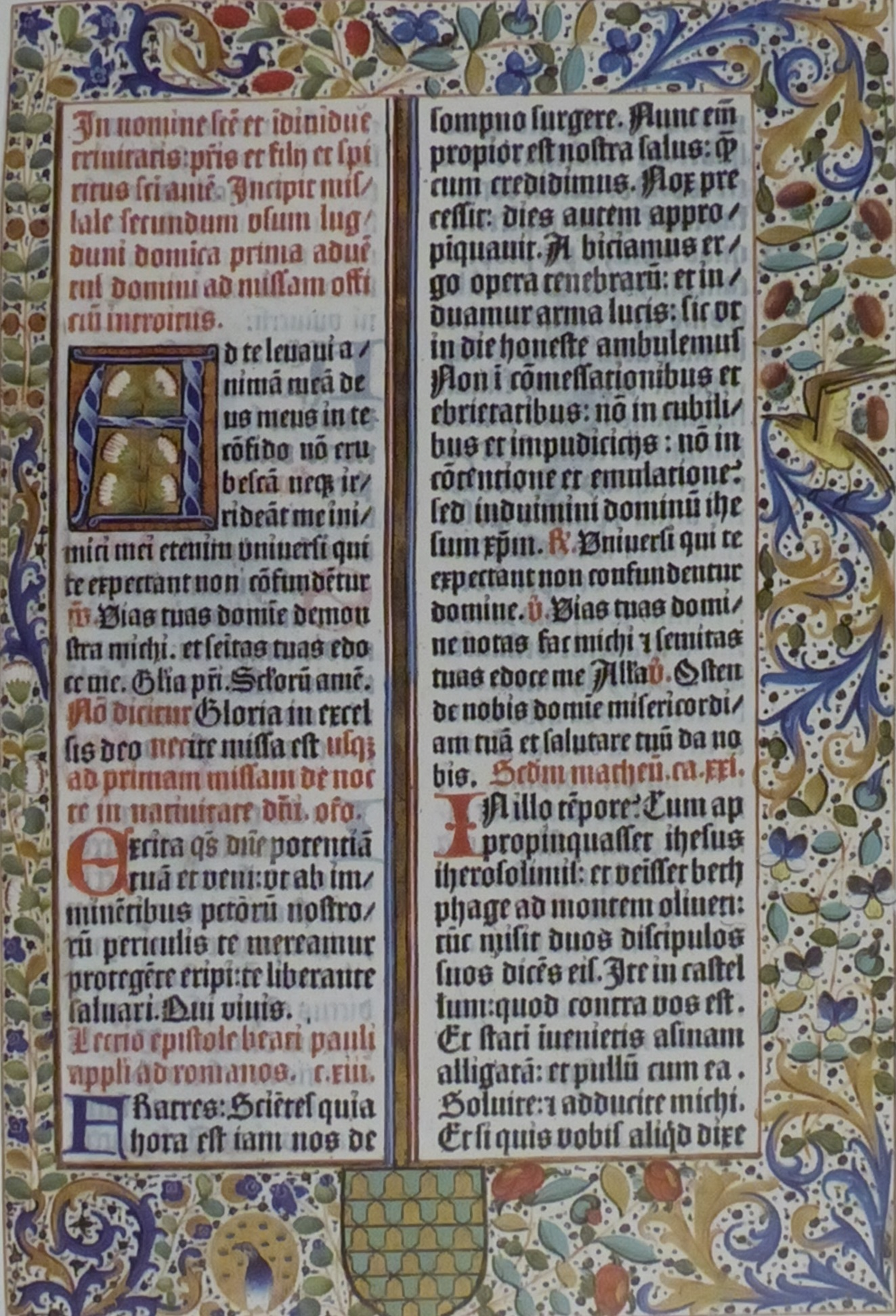 Missel manuscrit selon l'usage de Lyon, copié entre 1457 et 1470, pour le prieur Richard de Rovedis, de Montrottier (Rhône). Introït “Ad te levavi” du premier dimanche de l'Avent.